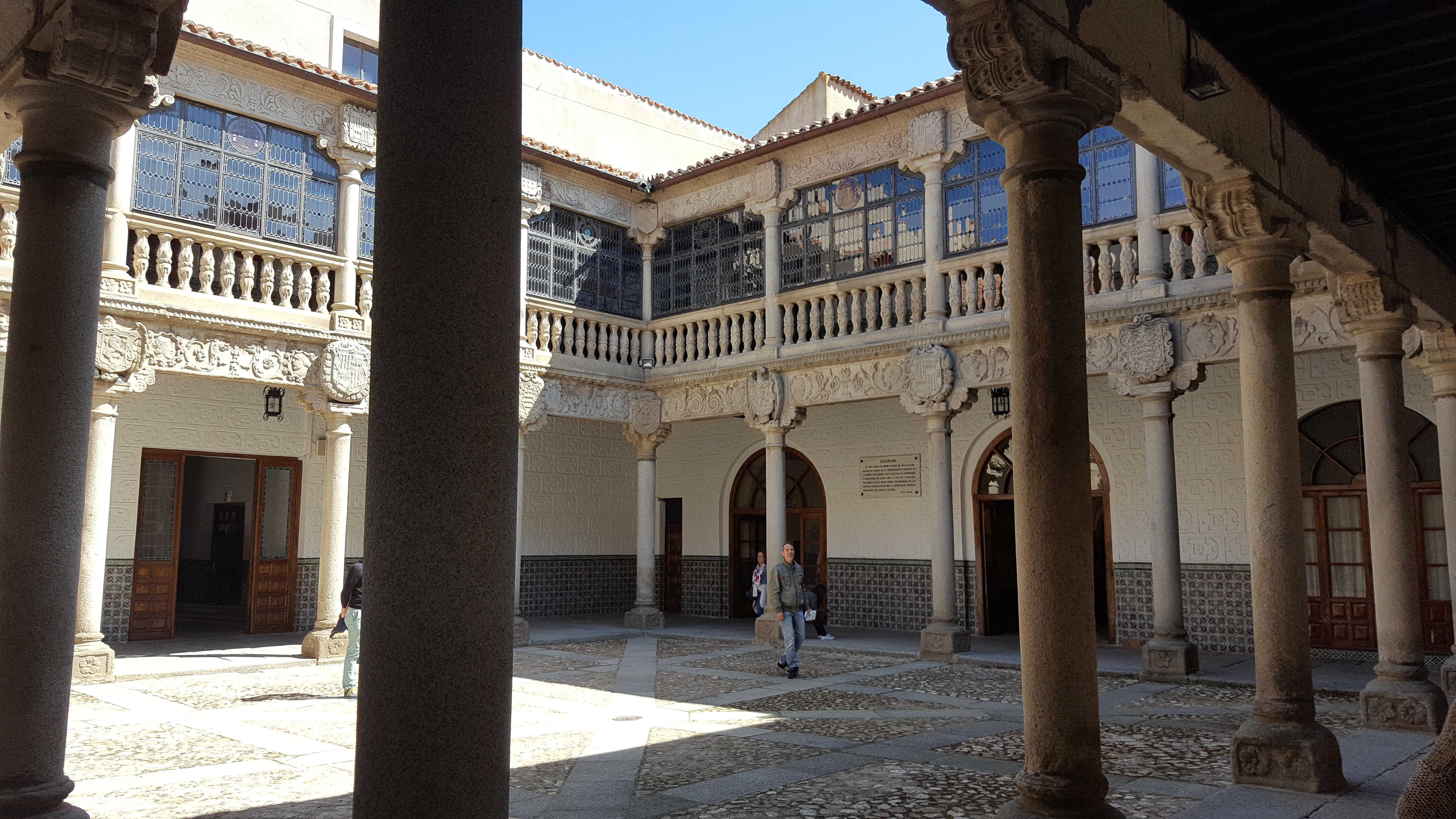 Palacio de Polentinos, hoy Museo Militar de Intendencia